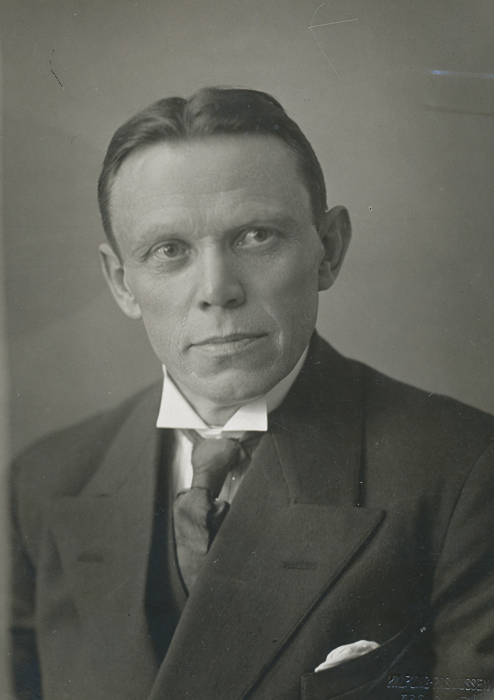 Kristian Gunnerus Johansen Ramsvik, kjøpmann, gårdbruker og politiker (V).